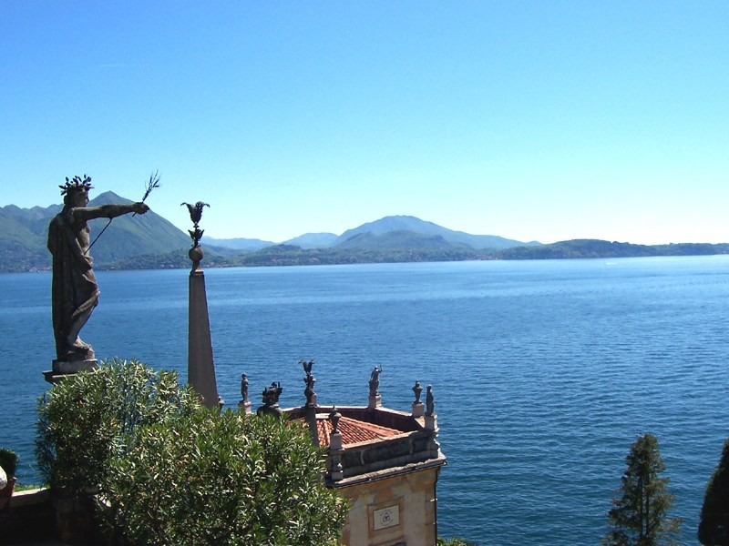 Veduta del Lago Maggiore dai giardini dell'Isola Bella